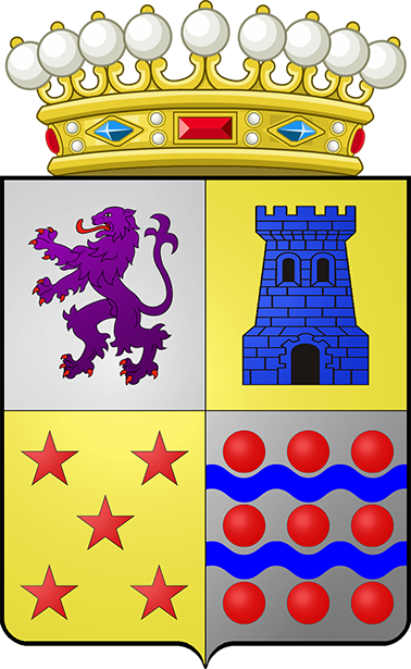 Brasão do 2º Conde de Castro e Sola. Escudo esquarteladoː 1º As armas de SILVA, em fundo de prata um leão em perfil, de côr purpura e garras vermelhas; 2º As armas dos SOLLA, em fundo de ouro, uma torre azul com vão negros; 3º As armas dos AFONSECA, em fundo de ouro, 5 estrelas vermelhas de cinco pontasː 4º As armas dos CASTRO (do Rio), em fundo de prata 9 besantes de vermelho em grupo de 3 em 3 intercalados com faixa ondulada em azul.